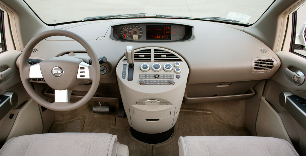 05 Nissan Quest dashboard